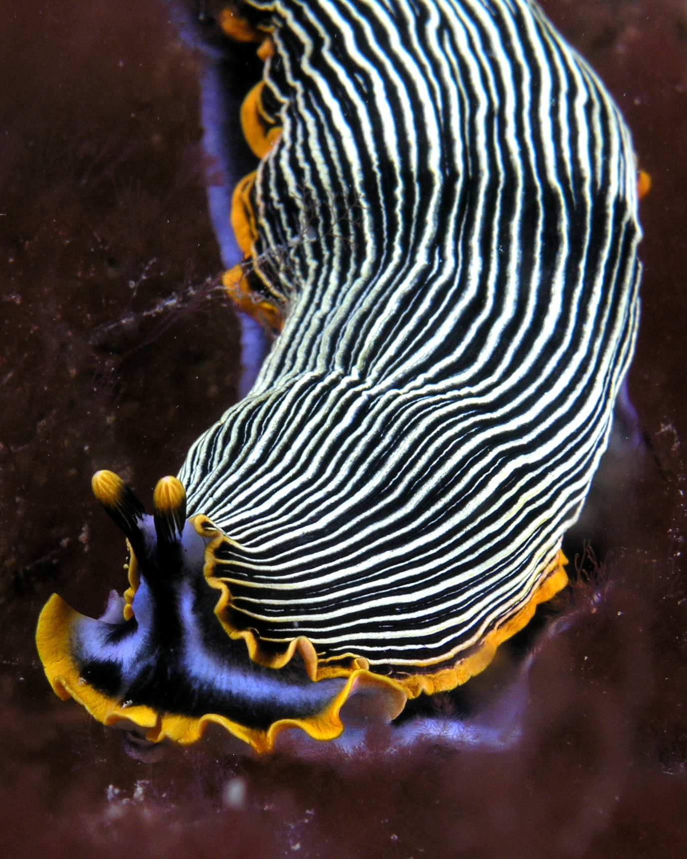 Armina sp. 1